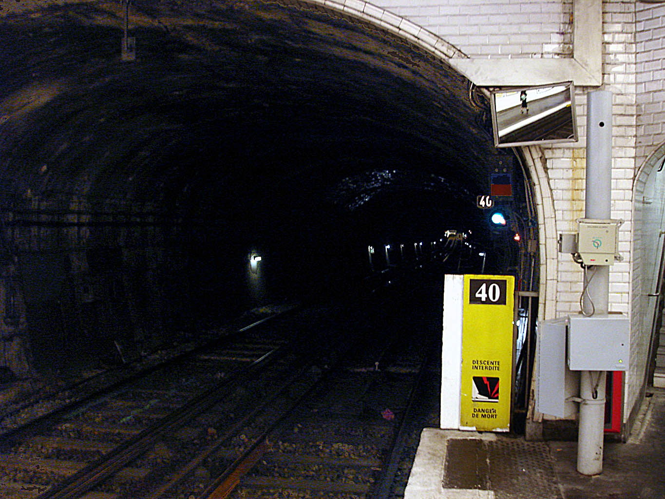 Station Bolivar, de la ligne 7bis du métro de Paris, France.